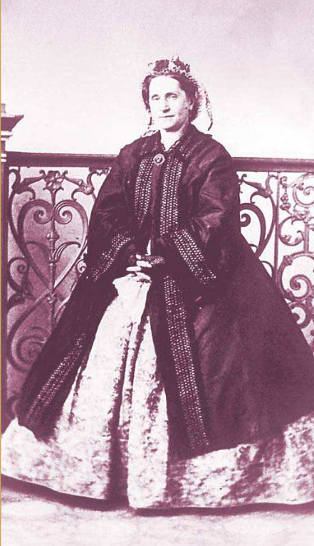 Isidora Zegers (1803-1869), compositora, cantante e impulsora de la cultura musical en Chile.